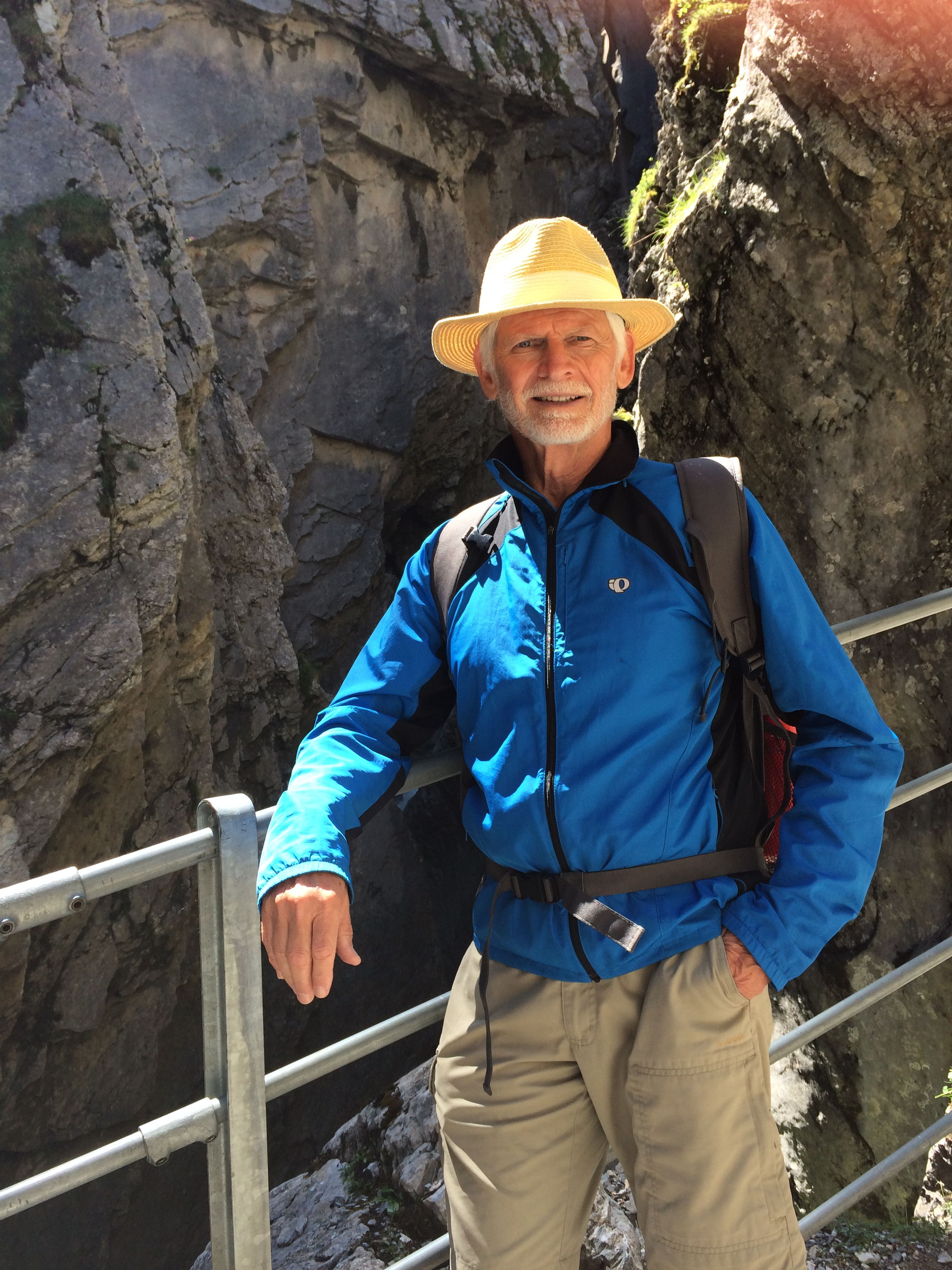 Manfred Miethe